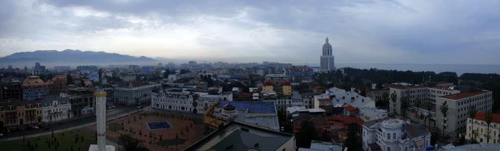 ბათუმის პანორამა